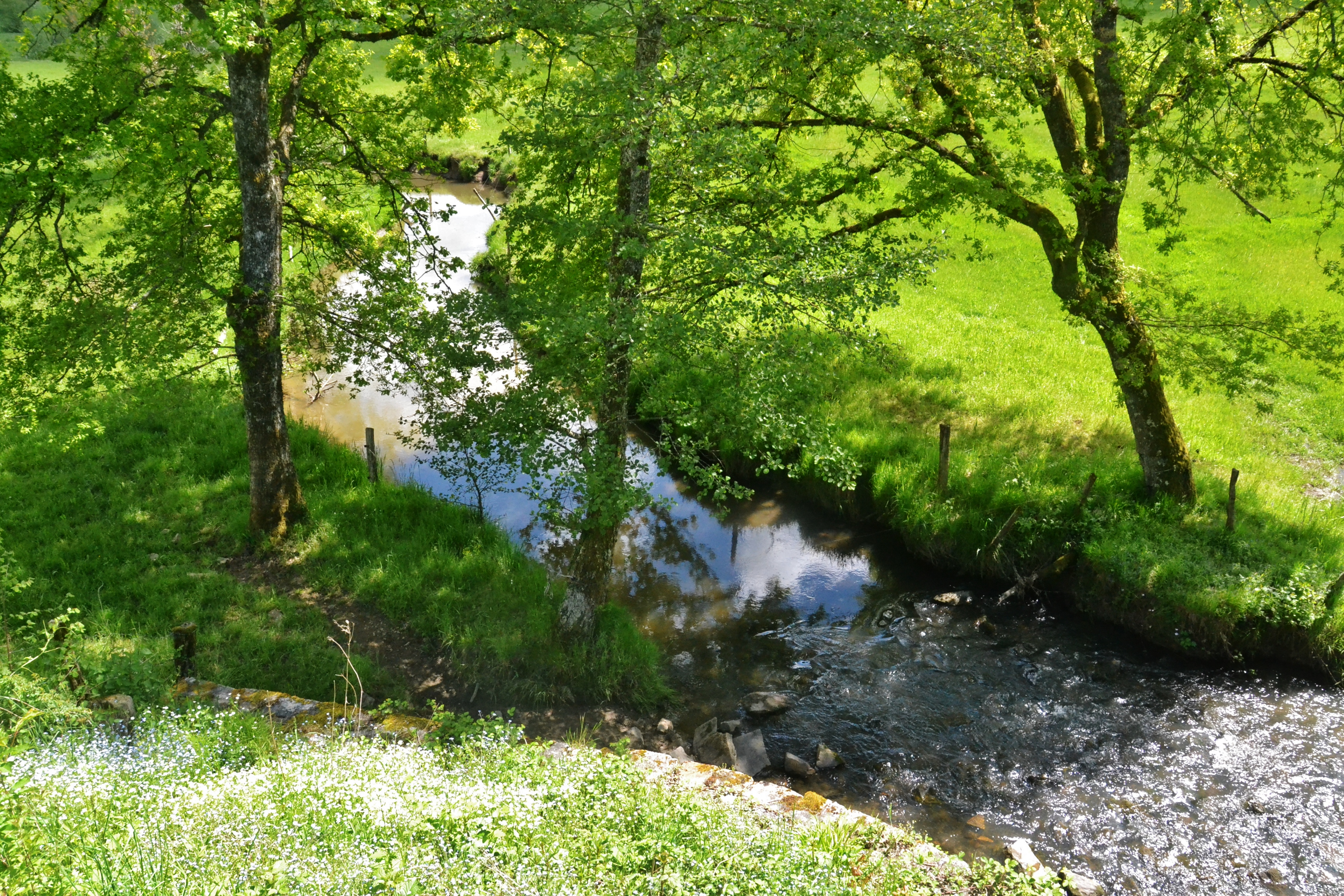 Le ruisseau Rujoux à Chamboulive, sur la route de Saint-Jal (Corrèze, France)